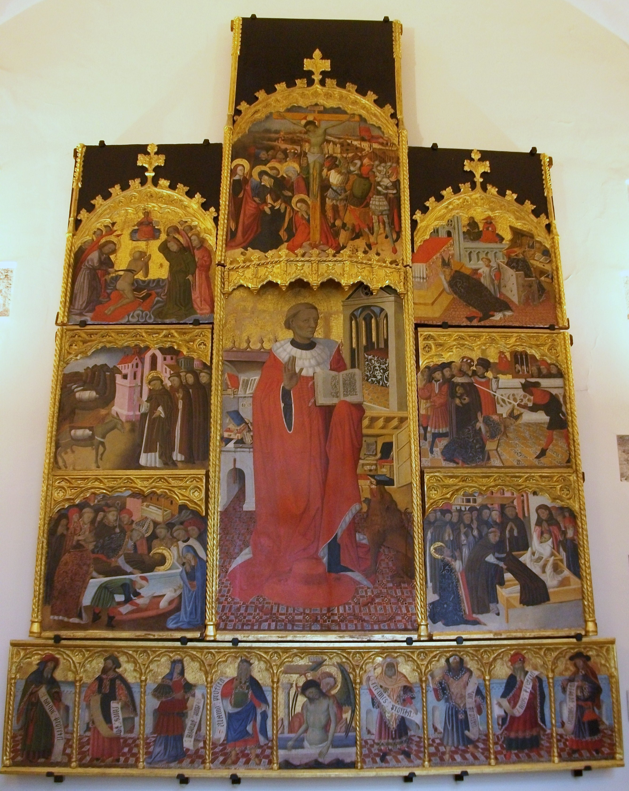 Retaule de Sant Jeroni, Jaume Mateu, Museu Catedralici de Sogorb, c. 1440-1450. Tremp sobre fusta, 422 x 288 cm.